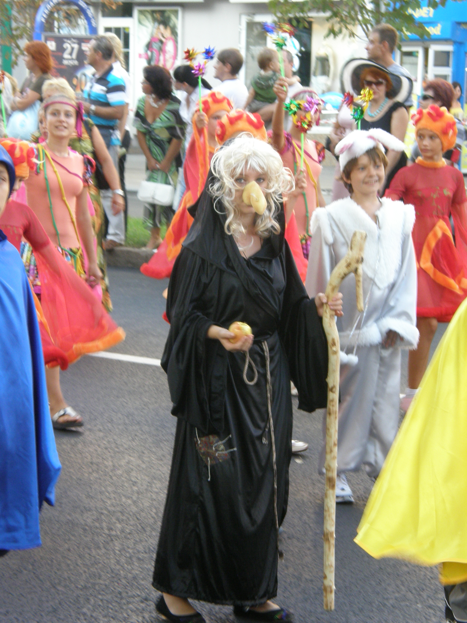 Донецк. Карнавал на день города.